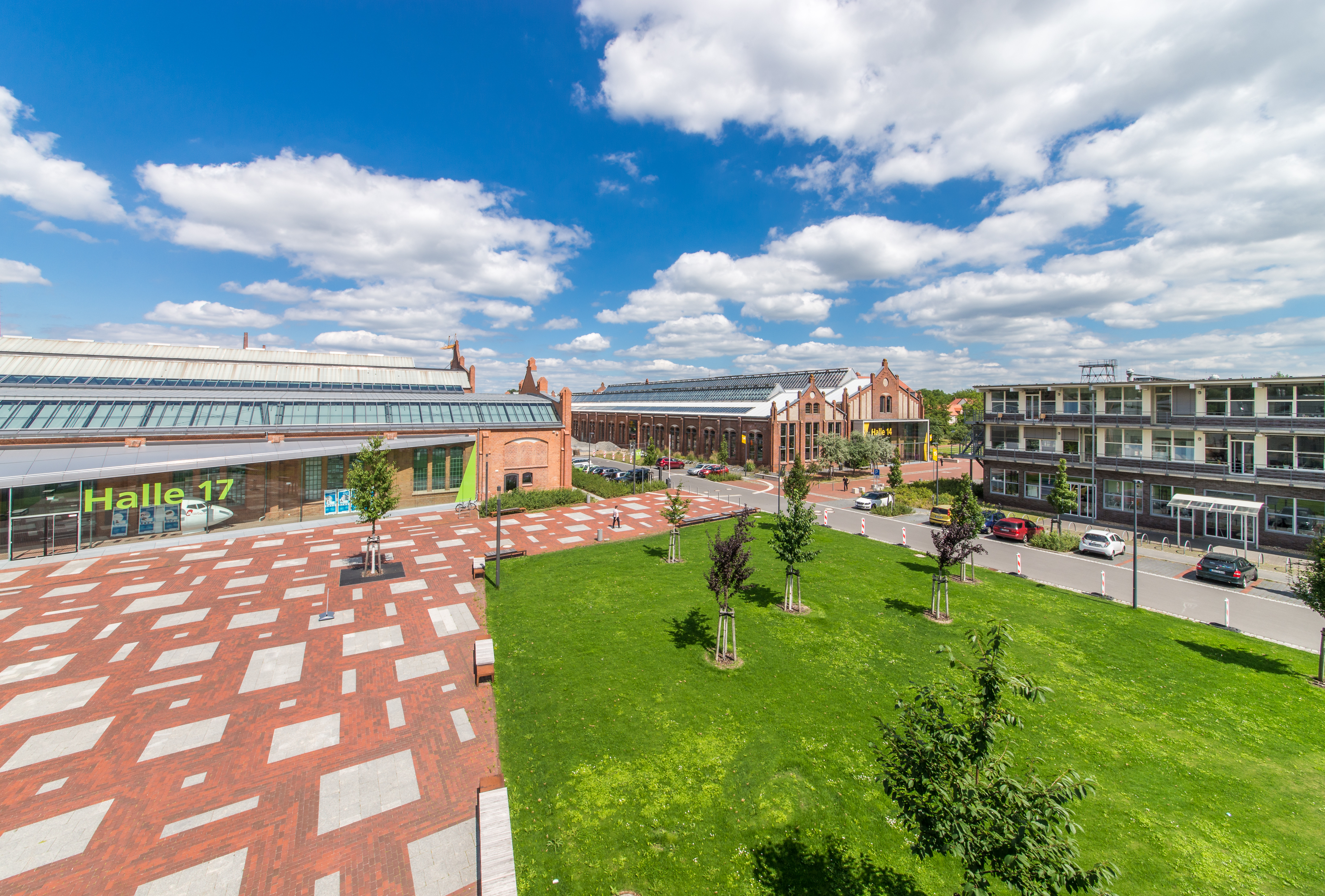 Fotograf: Matthias Friel